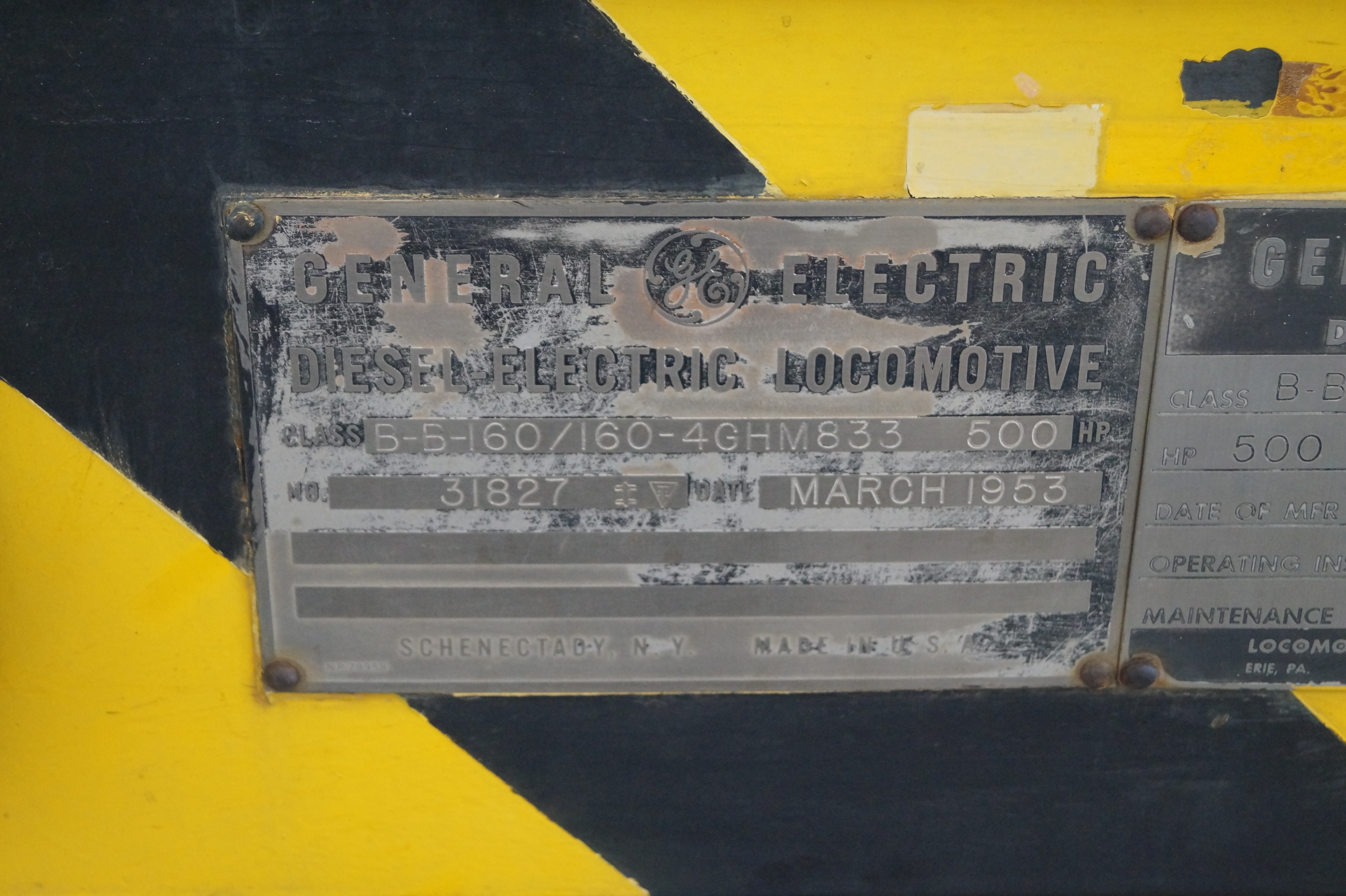 The Nevada State Railroad Museum which is an agency of the Nevada Department of Cultural Affairs. It is located at Yucca Street on the tracks of the historic Union Pacific Railroad branch Henderson-Boulder City near the former Boulder City Railroad Yards where the Hoover Dam construction equipment was unloaded in the 1930s.